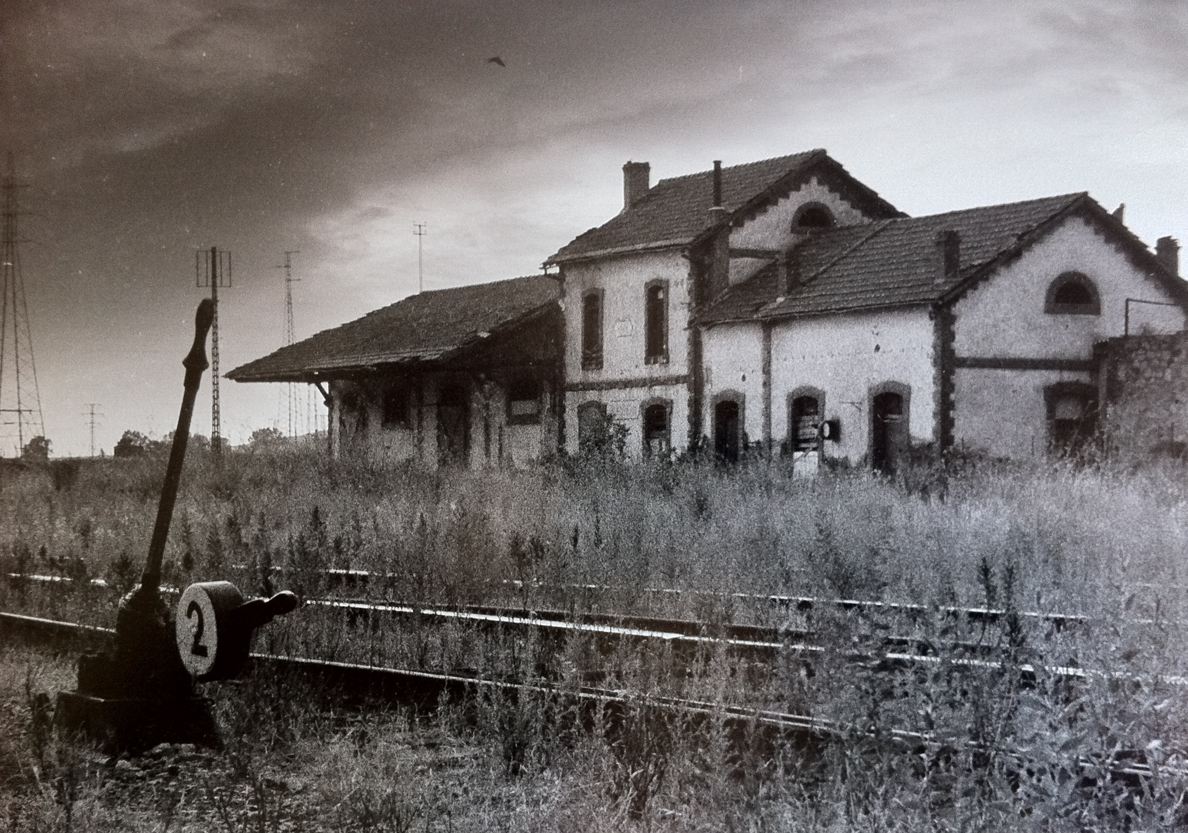 Antigua estacion de Peñarroya de la linea que la unia con Puertollano.